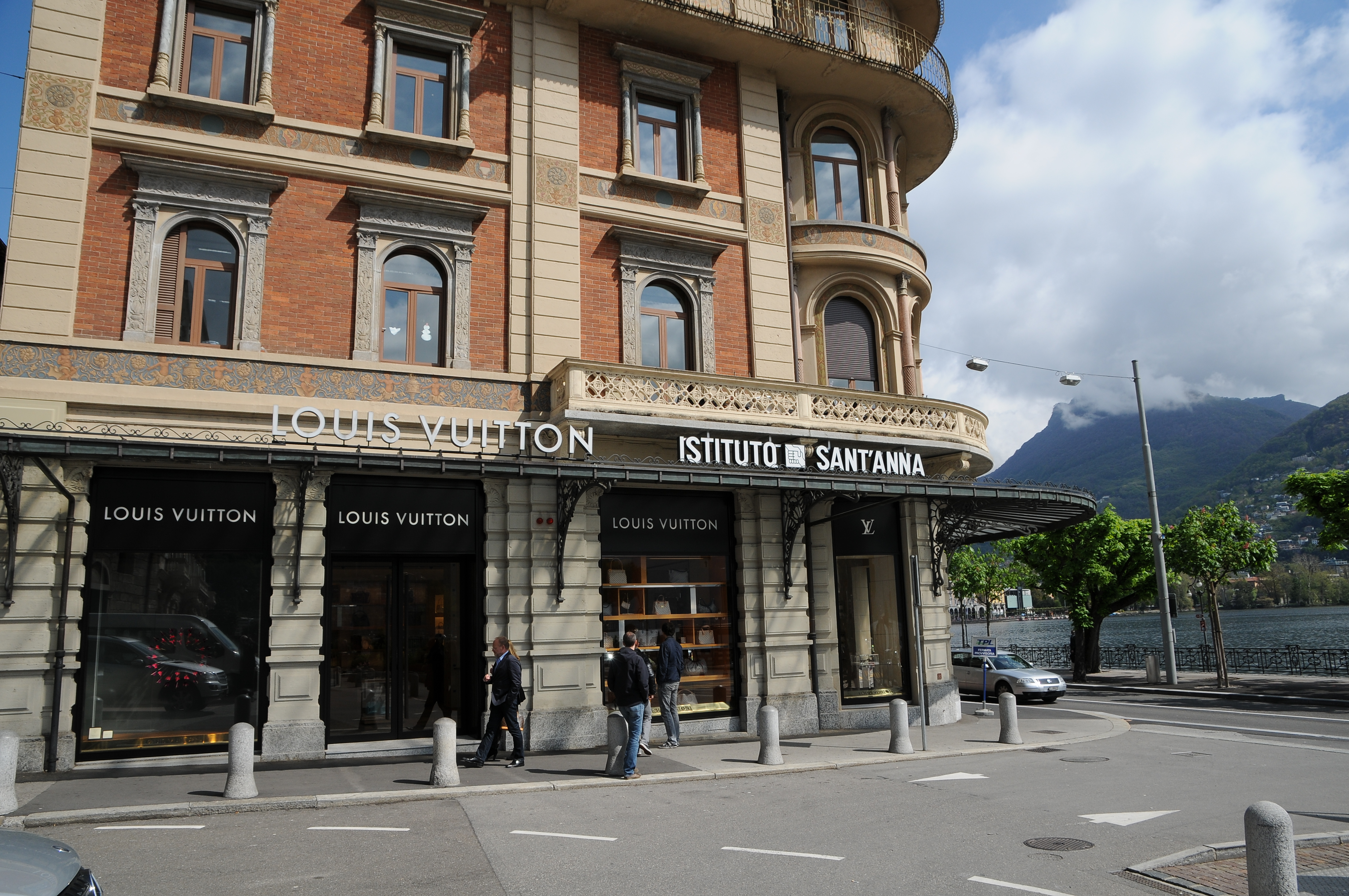 Via Nassa 31, Lugano.